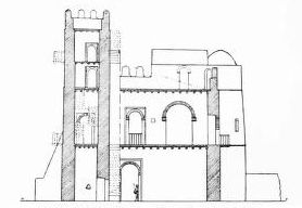 Ras Gimb